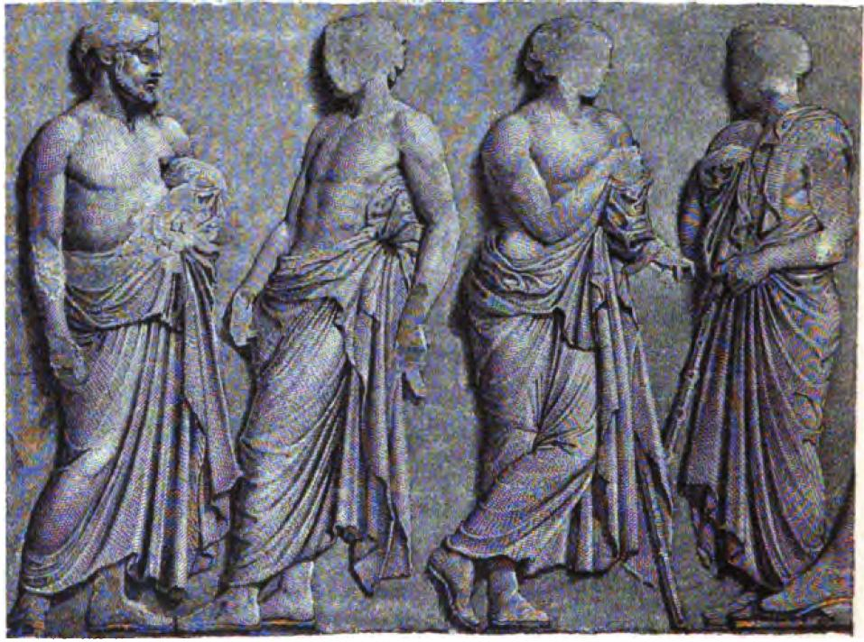 Die Archonten